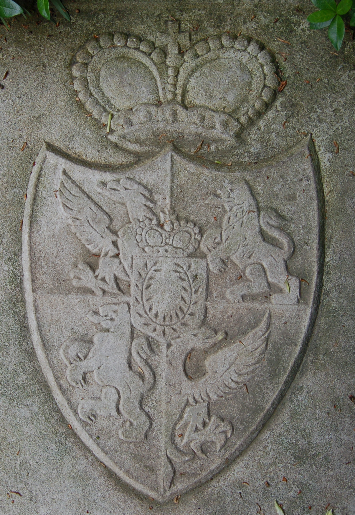 Das Wappen deren von Schoenaich-Carolath-Schilden im Park des Herrenhauses in Haseldorf neben der Sankt-Gabriel-Kirche